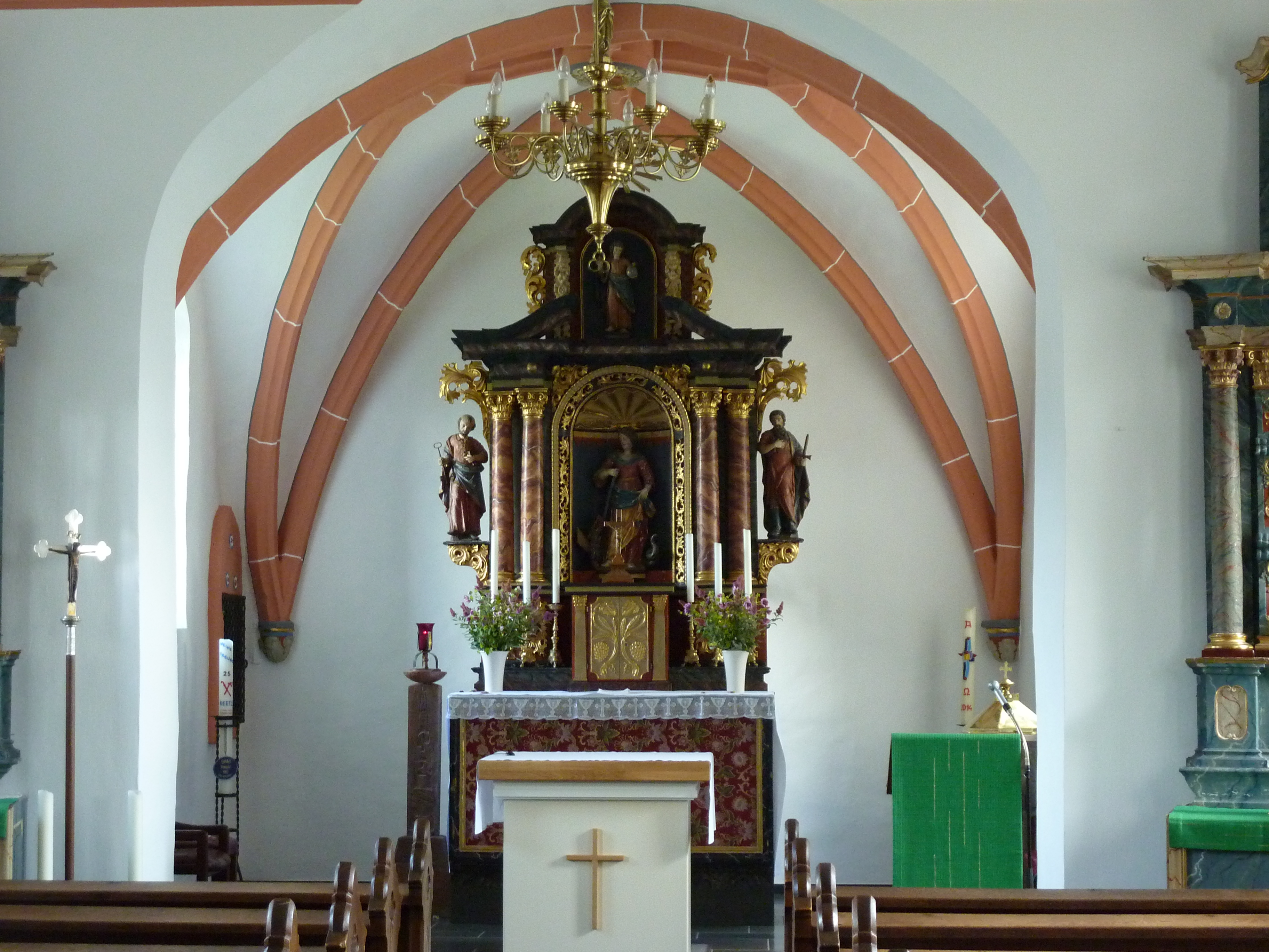 Reetz, Oberdorf 1, kath. Pfarrkirche 11, Innenraum, Chor